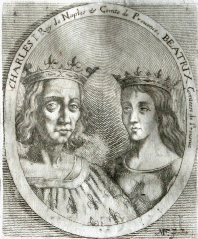 Charles Ier comte de Provence et sa femme Béatrice de Provence. Gravure de l'histoire des comtes de provence par Antoine de Ruffi, 1655.